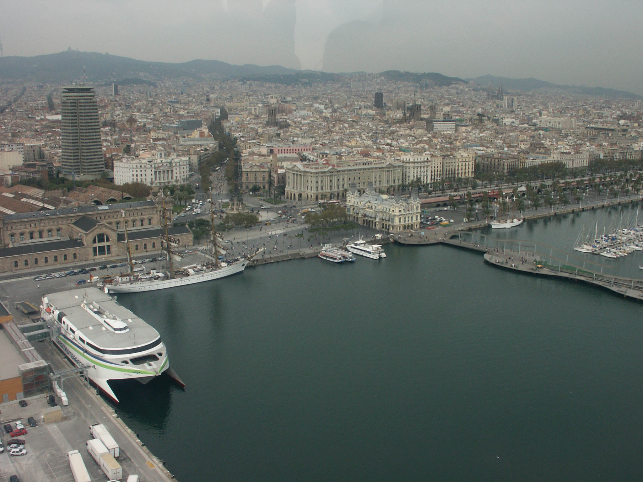 Luchtfoto van Barcelona (eigen foto)foto genomen door gebruiker:bernard_bill5 in november 2002